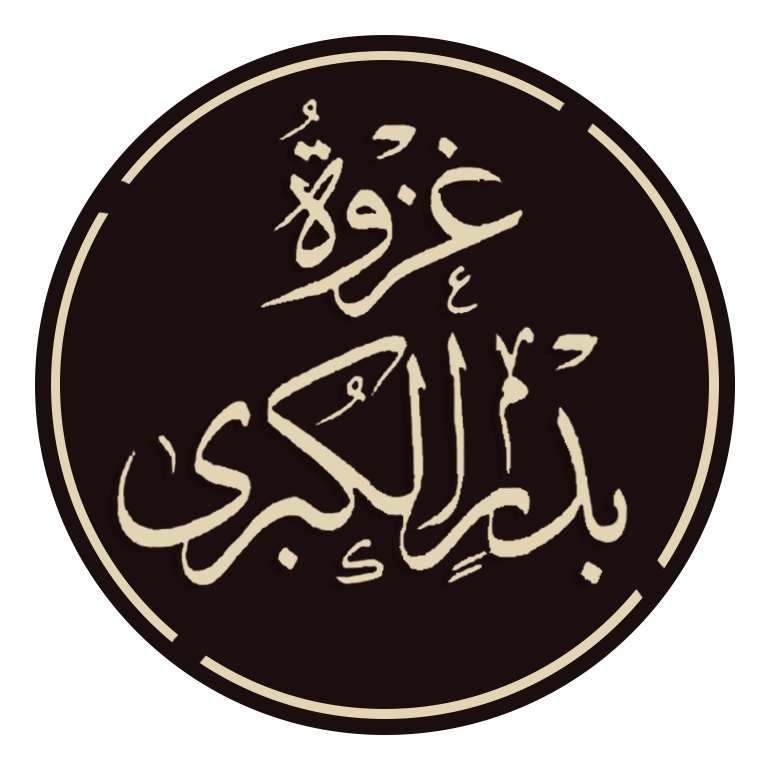 تخطيط غزوة بدر الكبري